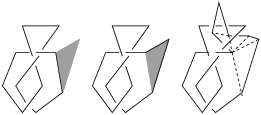 Teoria dei nodi - Nodi tramite spezzate © BW 2004